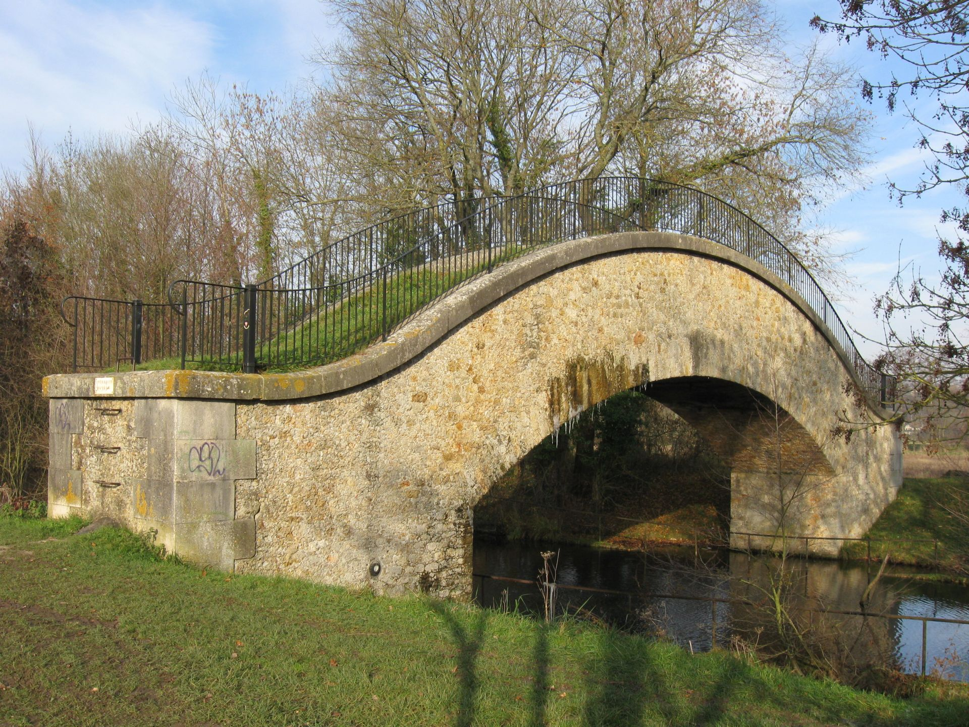 Aqueduc de la Dhuis franchissant le canal latéral au Grand Morin. (commune de Montry, département de la Seine-et-Marne, région Île-de-France).